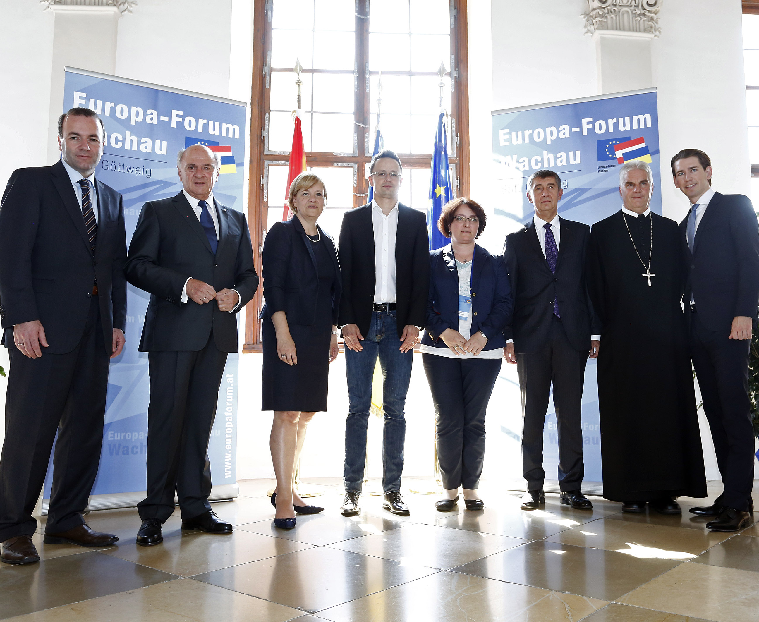 Europa-Forum Wachau 2015